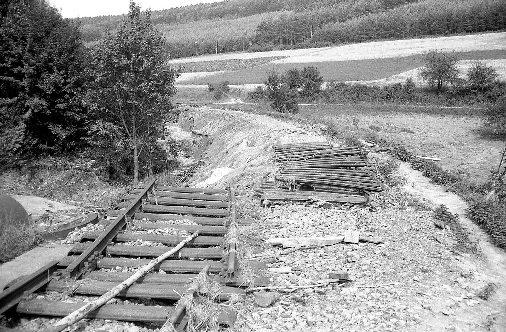 Dittwar-Bahnhof; Bahndamm am Muckbachdurchlass wird nach Jahrhunderthochwasser im Sommer 1984 wieder aufgeschüttet, und die Gleislücke wurde geschlossen. Blickrichtung Tauberbischofsheim.